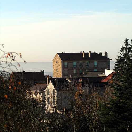 Cormeilles-en-parisis. 2004 Jean-noël Lafargue